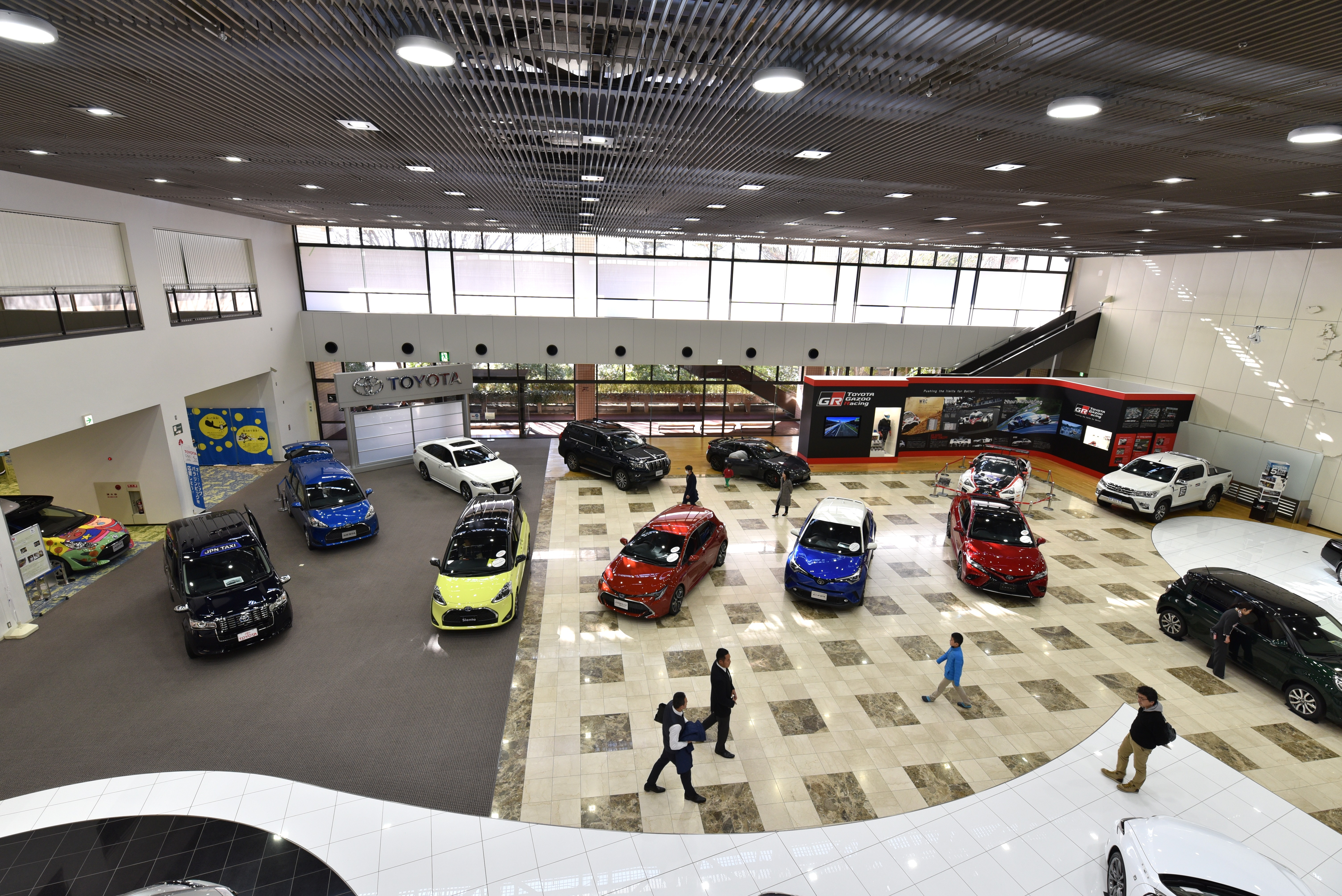 ショールーム Nikon D750